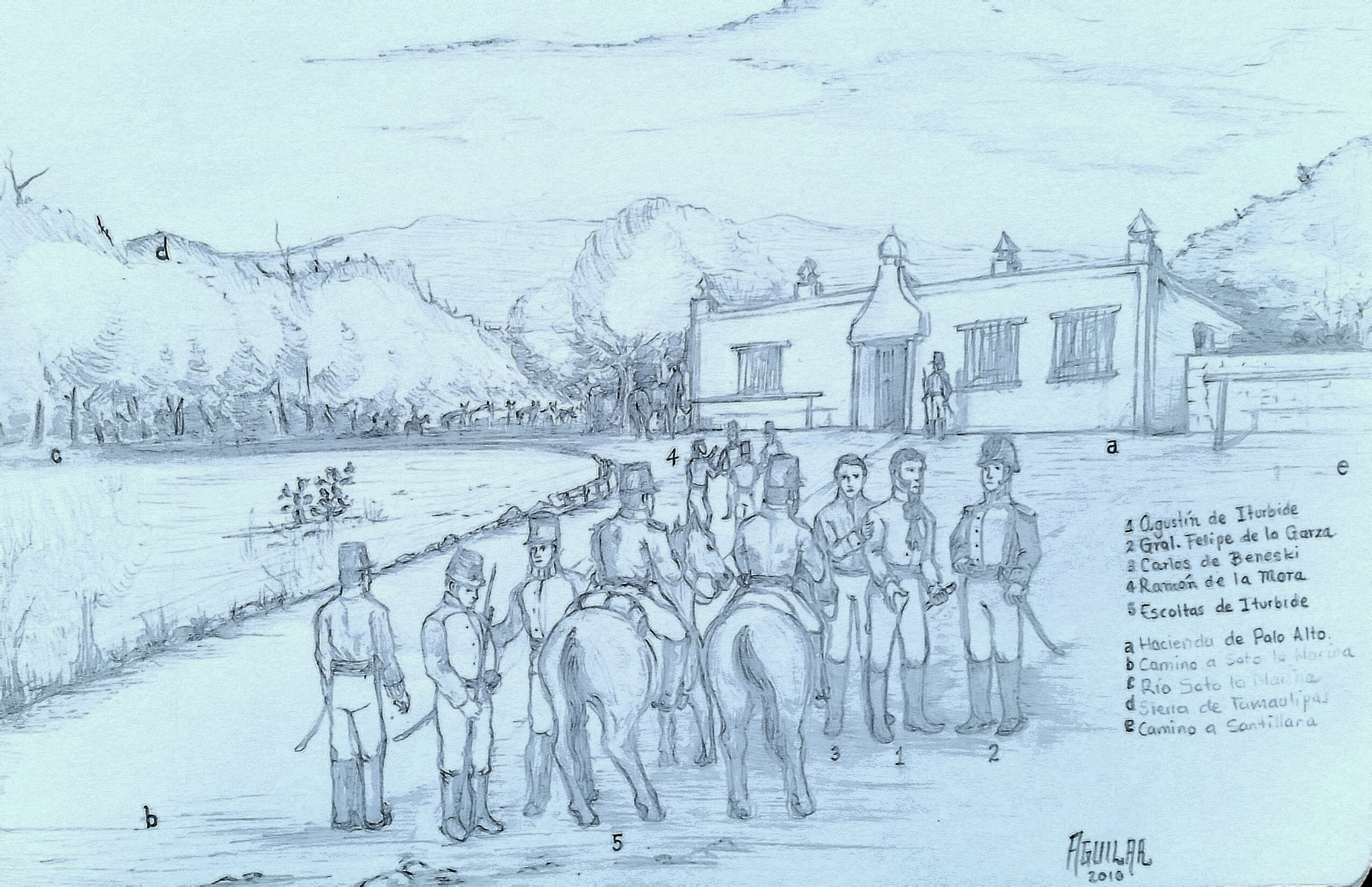 Recreación del apresamiento de Iturbide en la hacienda de Palo Alto jurisdicción de la Villa de Santillana el día 18 de julio de 1824.